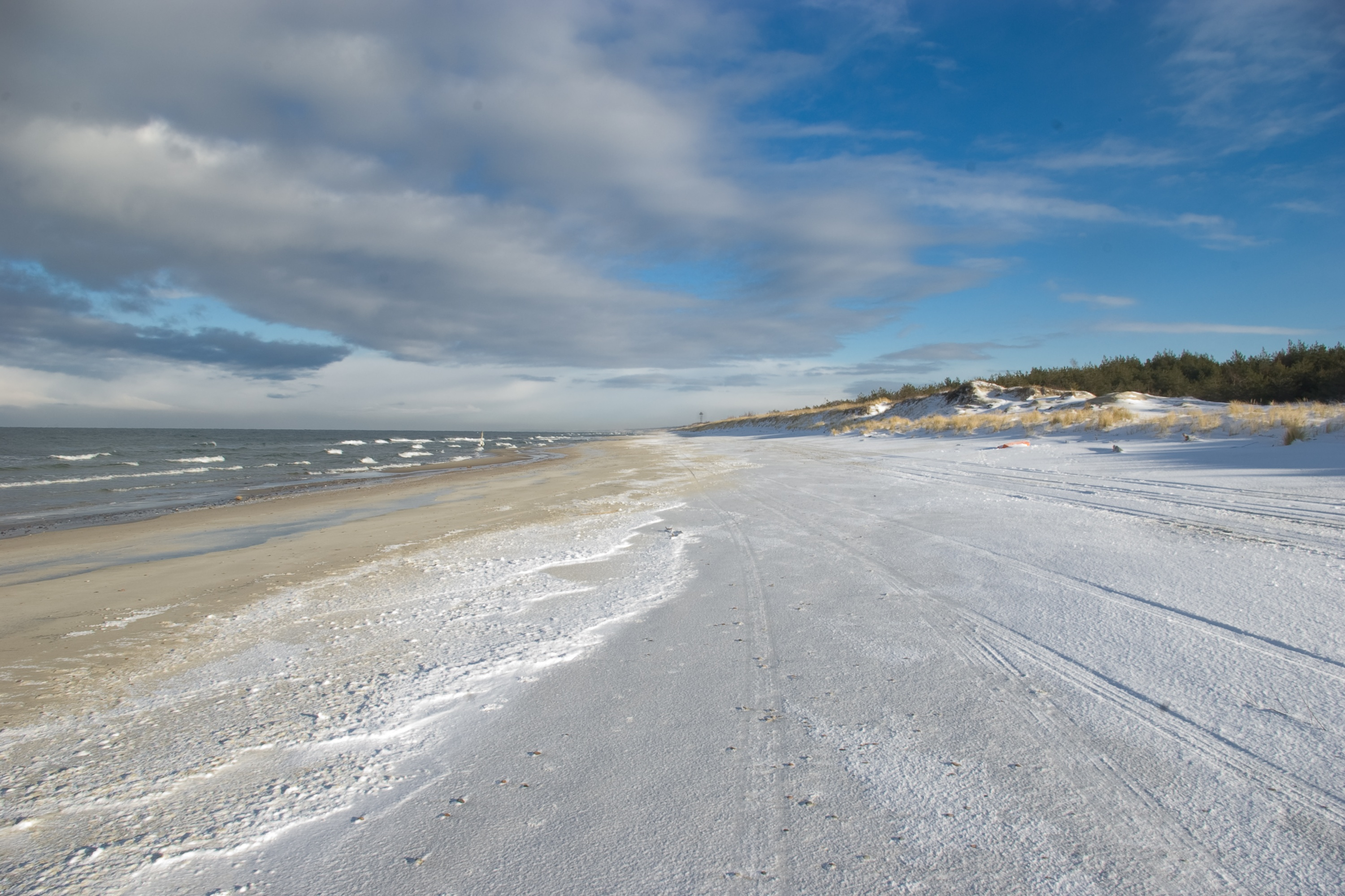 Vistula Spit winter 2009 (Балтийская коса зимой 2009-го года)